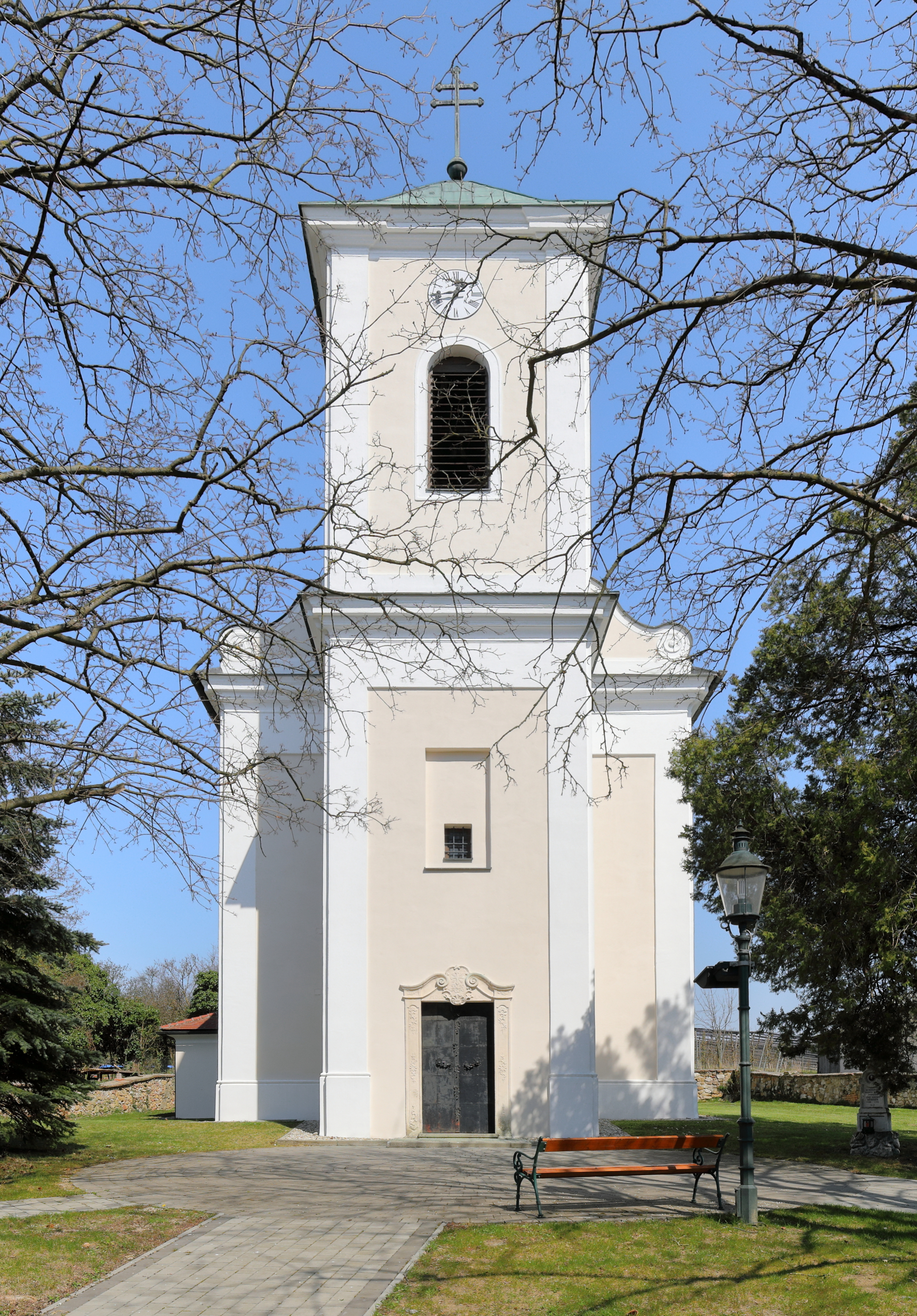 Südansicht der röm.-kath. Pfarrkirche hl. Jakobus der Ältere in Merkersdorf, ein Ortsteil der niederösterreichischen Marktgemeinde Ernstbrunn. Die spätbarocke Saalkirche mit vorgestelltem Fassadenturm wurde 1764 vom Baumeister Ignaz Gunold errichtet.